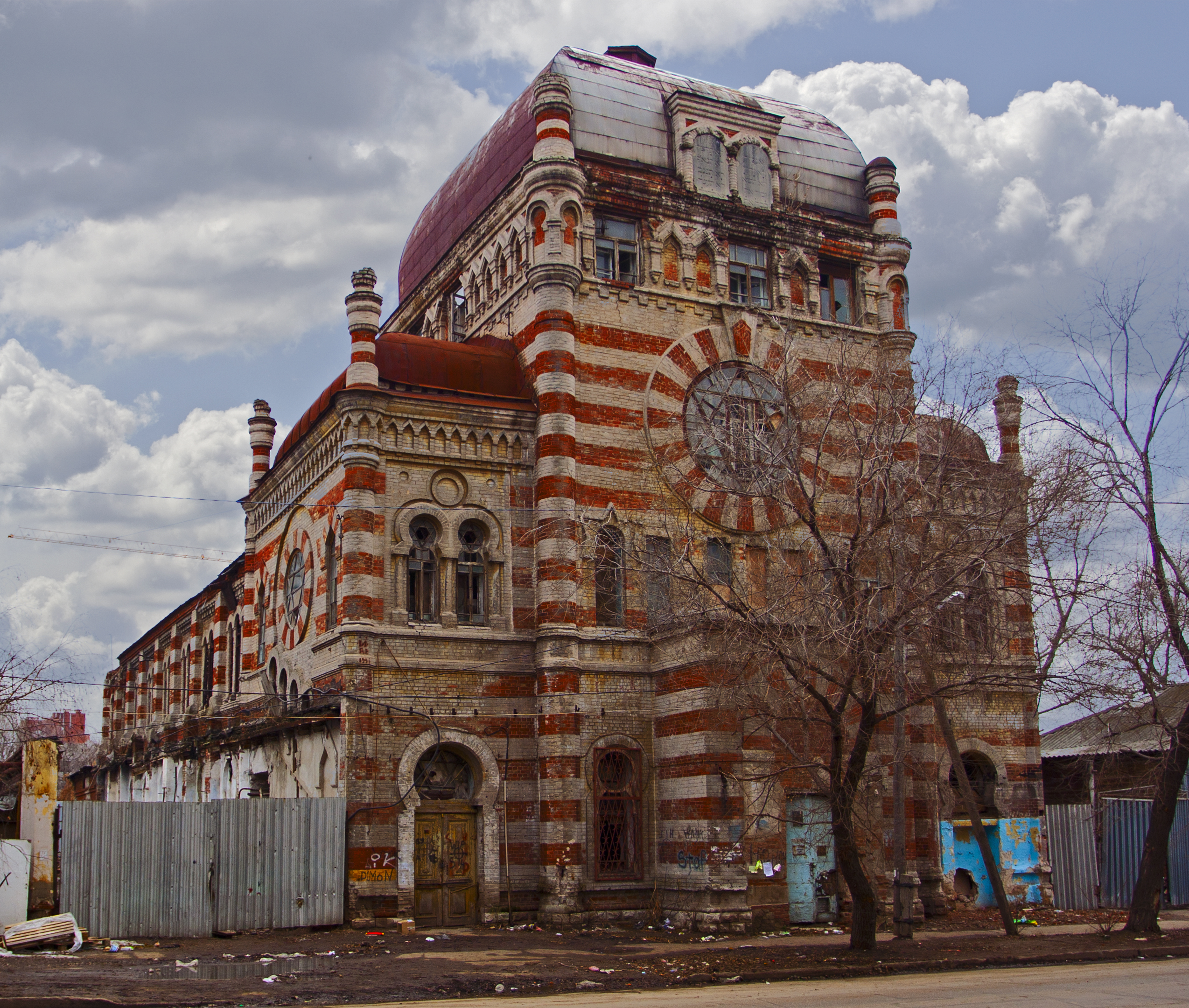 Самарская хоральная синагога